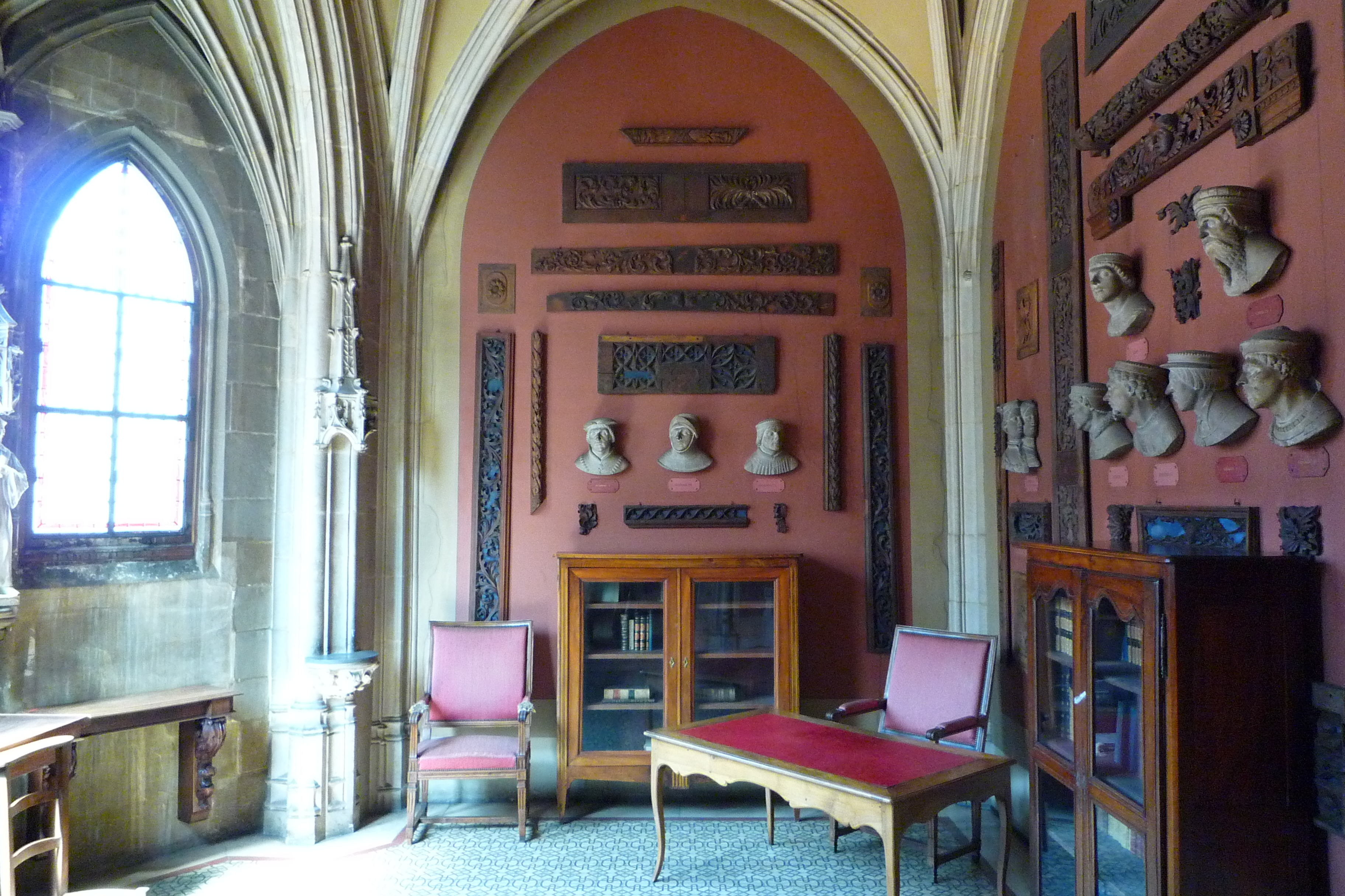 Chapelle des dauphins d'avant 1349 (rattachement du Dauphiné à la France) - Parlement du Dauphiné , Grenoble